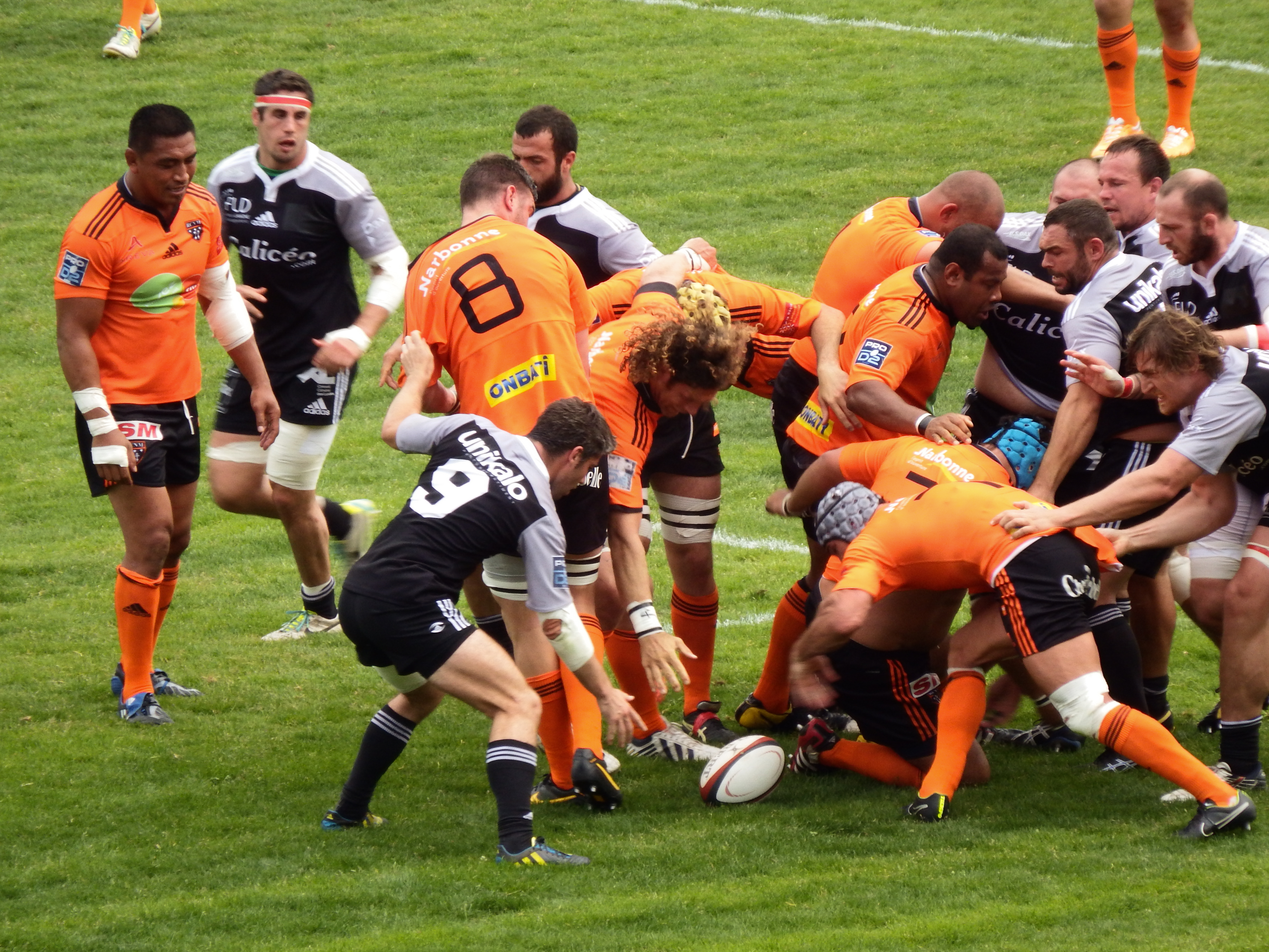 Pro D2 2014-2015 — 3 May 2015, parc des sports et de l'amitié. Match between: RC Narbonne Méditerranée — US Dax